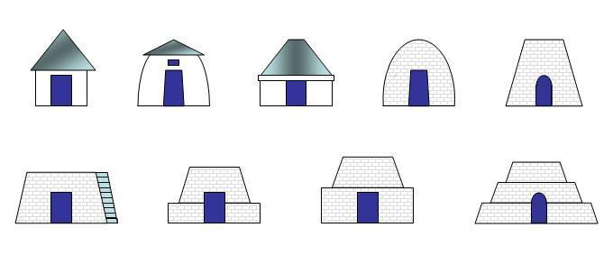 Typen von Trulli und Pagghiare in Apulien